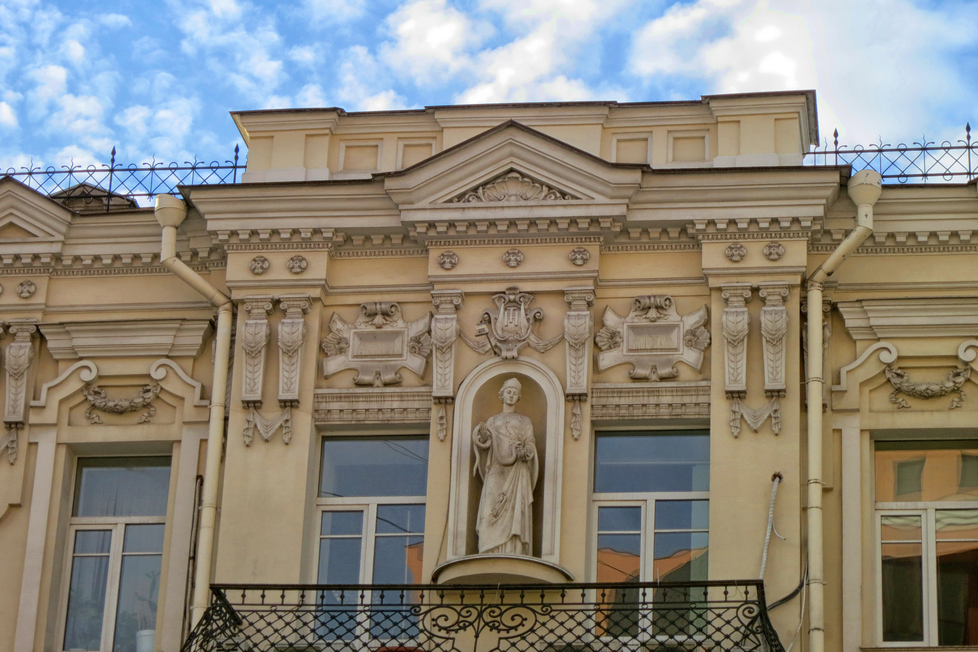 Статуя Гигеи. Доходный дом Н.И. Токарева: улица Большая Садовая, 106/46, проспект Чехова, литеры А, Б, Ростов-на-Дону, Ростовская область